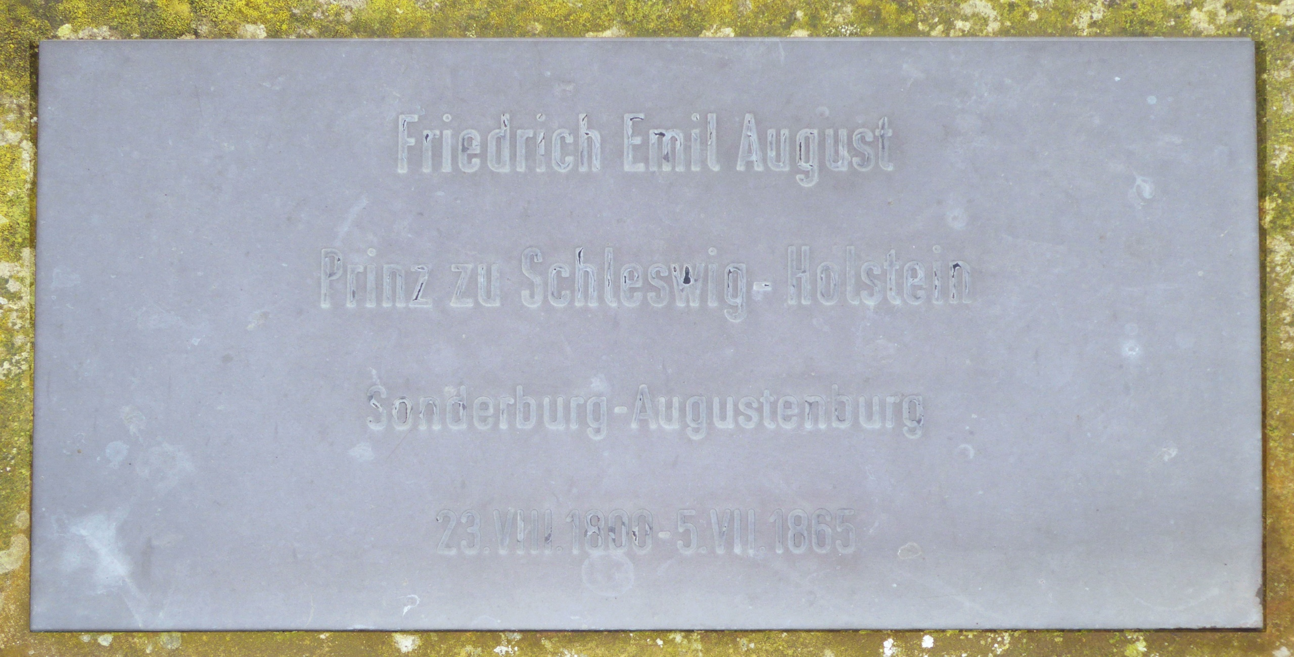 Grabplatte Friedrich Emil August von Schleswig-Holstein-Sønderborg-Augustenburg - Prinz von Noer - Fürst von Noer - Friedhof der Dreifaltigkeitskirche von Krusendorf. Foto Wolfgang Pehlemann P1350942